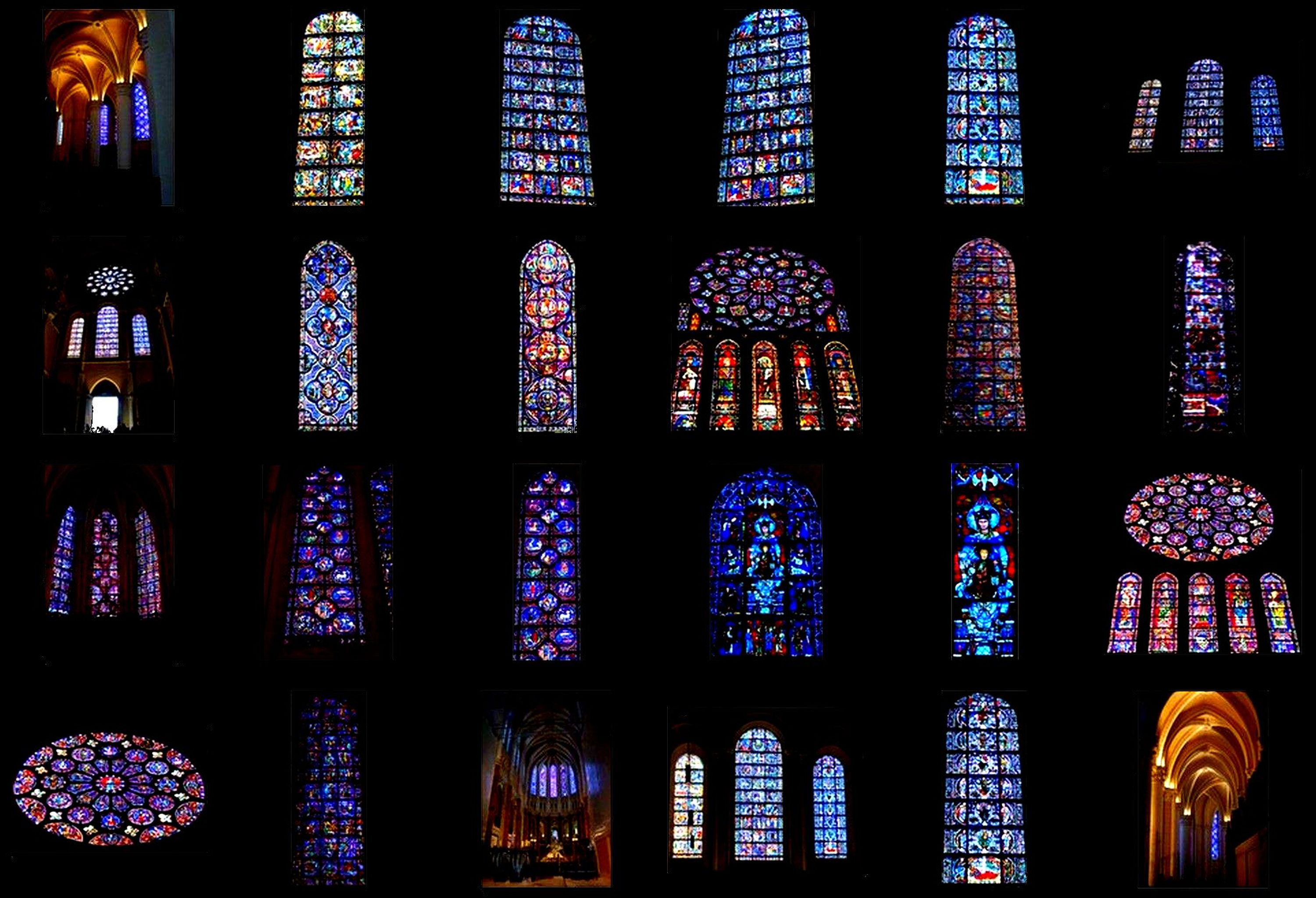 vitraux et nefs